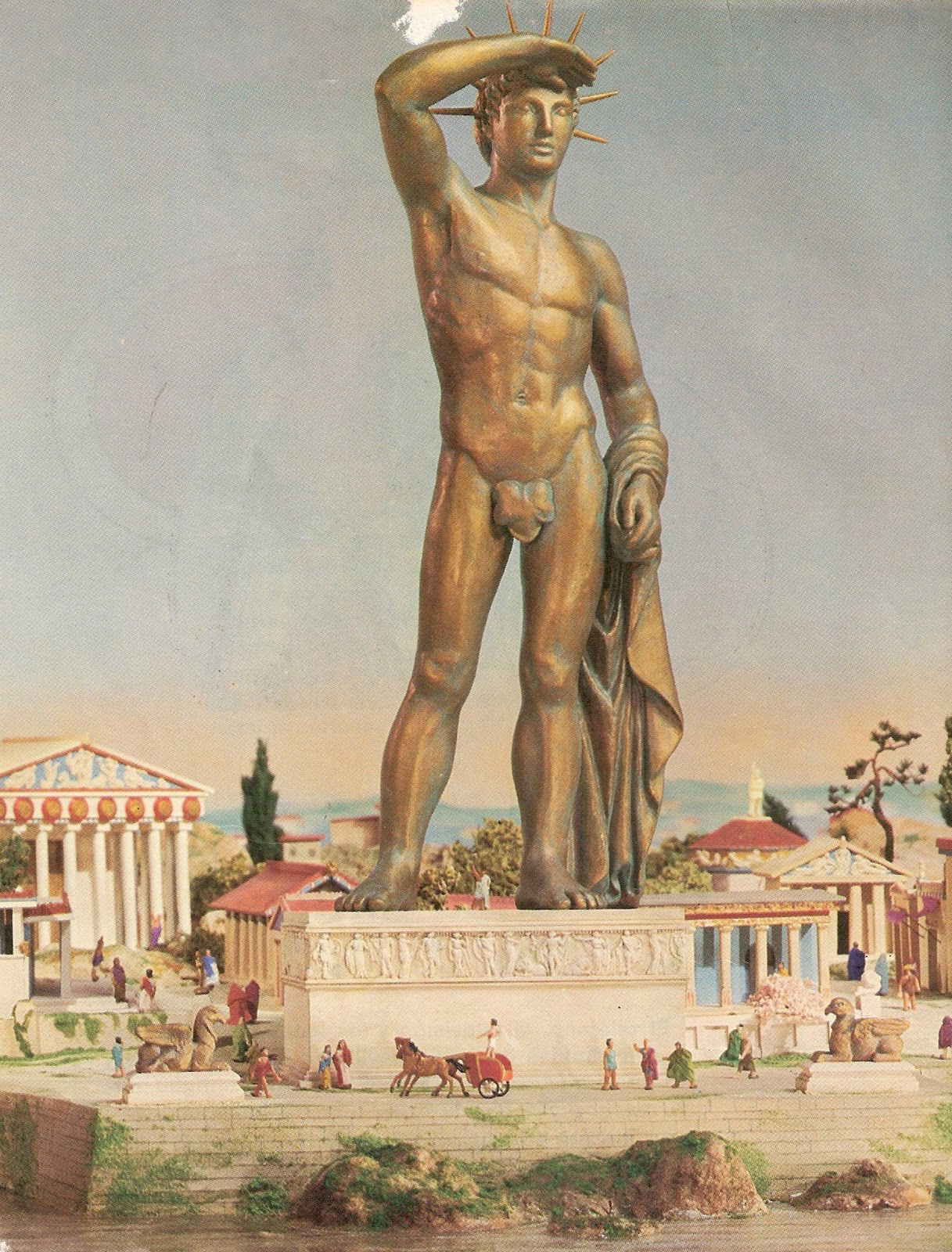 El Coloso de Rodas, y su posible aspecto.